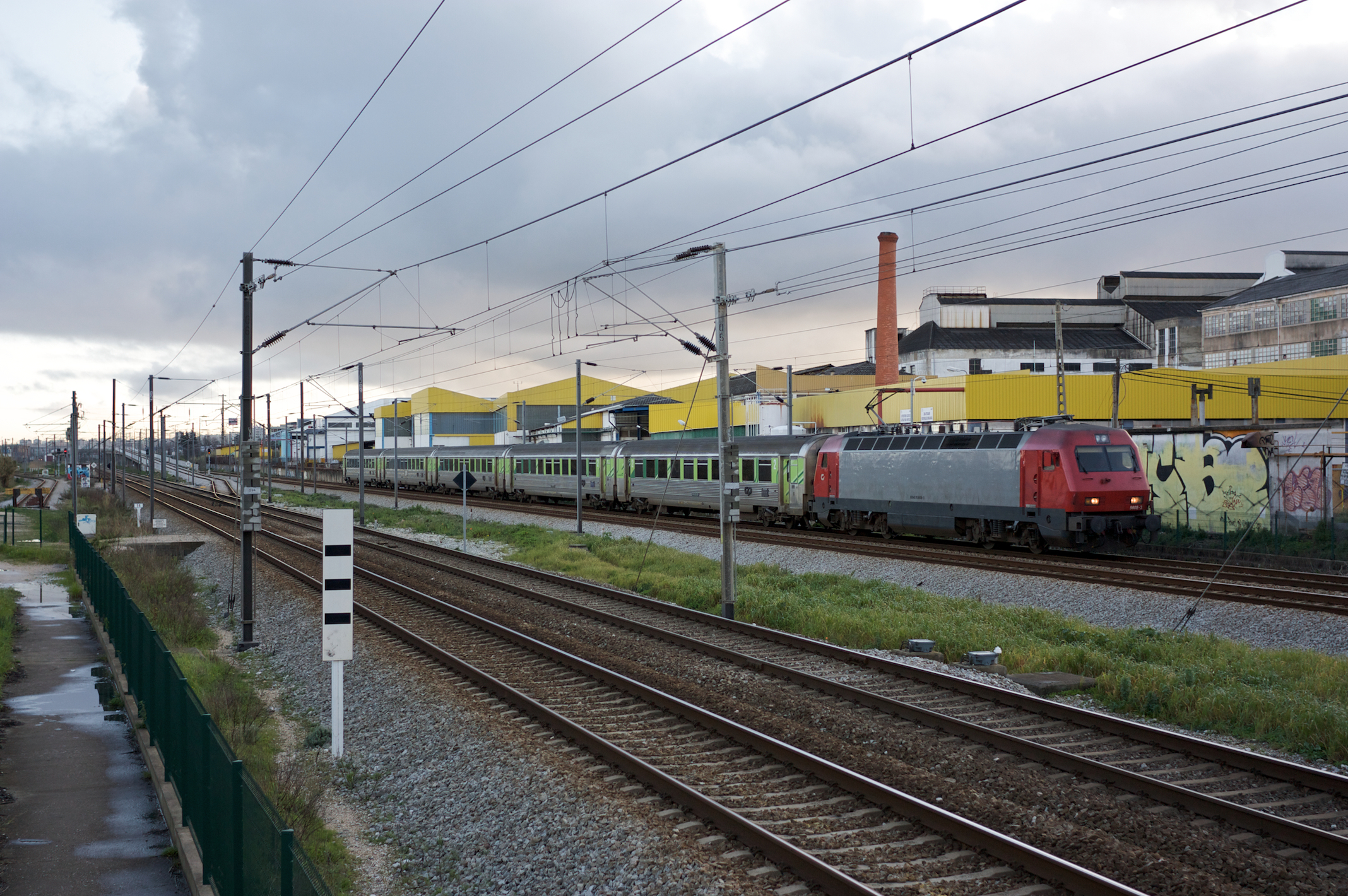 Tipo: Comboio Intercidades 621 [Lisboa • Santa Apolónia - Guimarães] Local: Santa Iria de Azóia [Linha do Norte, PK 14] Data e hora: 3 de Março de 2010 [17h48] Material: Locomotiva 5608 + 5 carruagens Corail